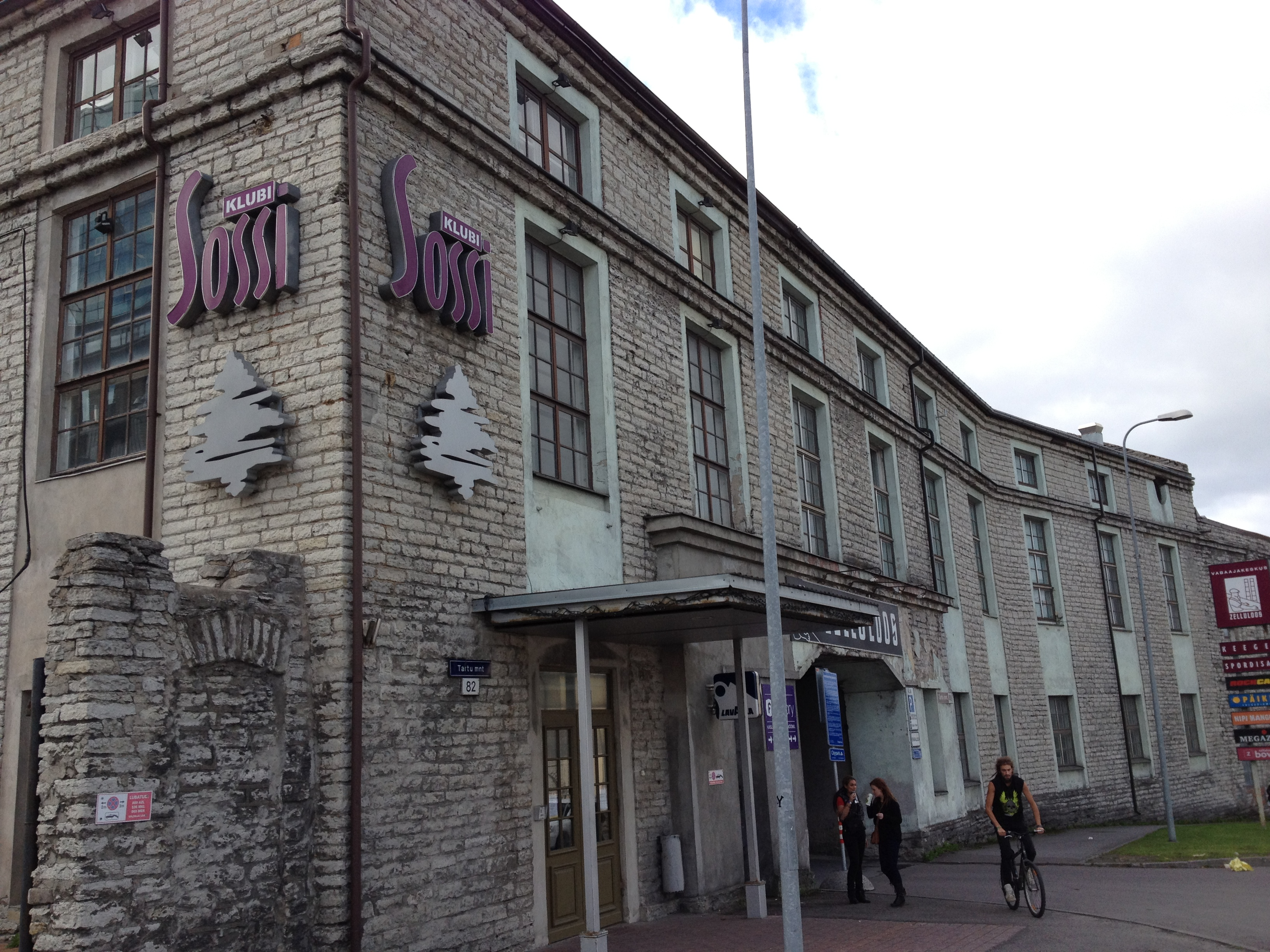 Tselluloosi- ja paberivabriku II paberivabrik, 1913. a.